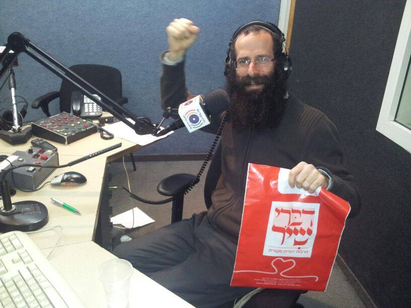 רן שריד